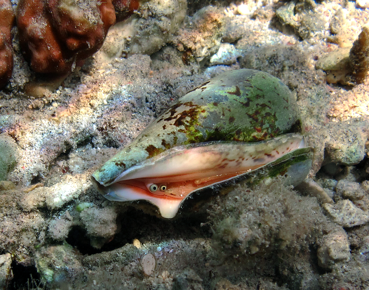 Le gastéropode Strombus decorus à la Réunion.